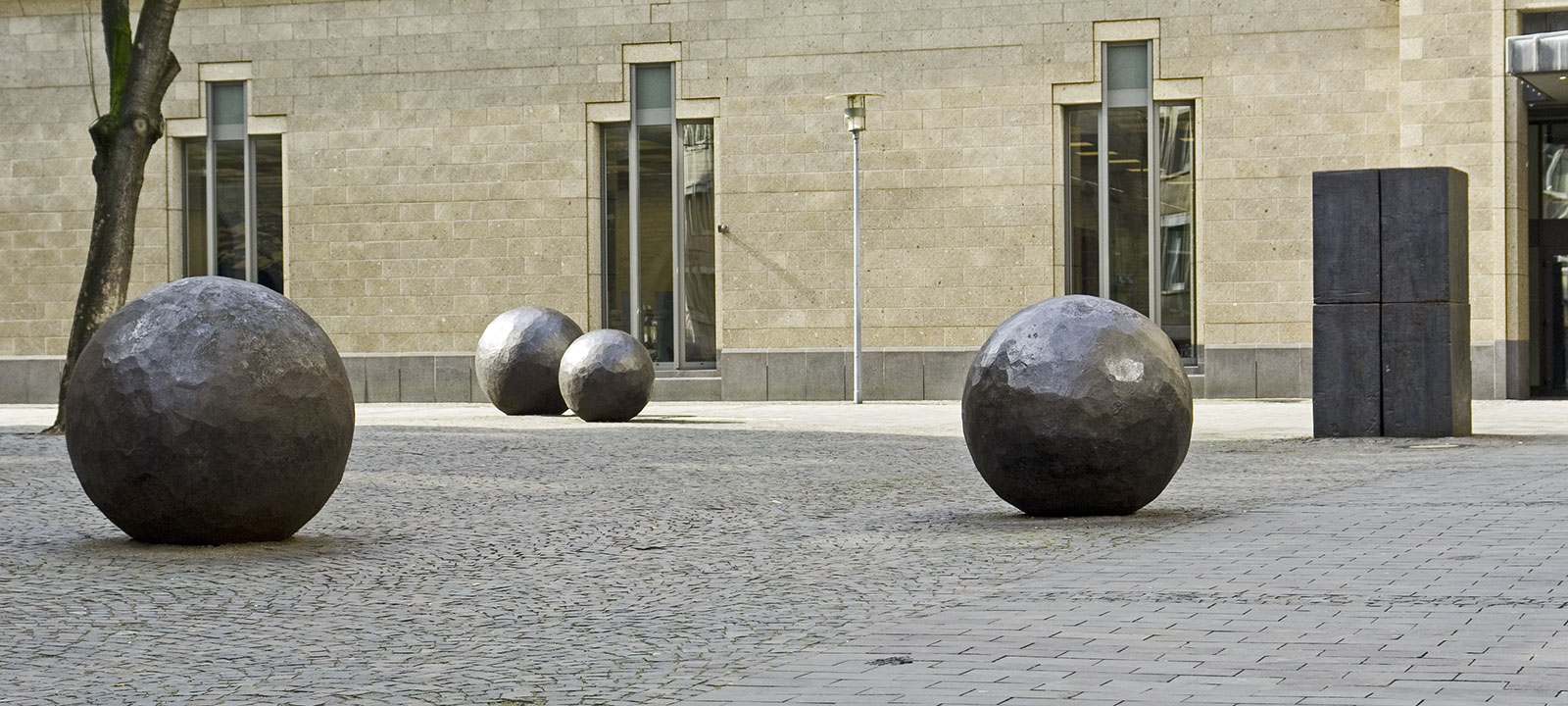 See below